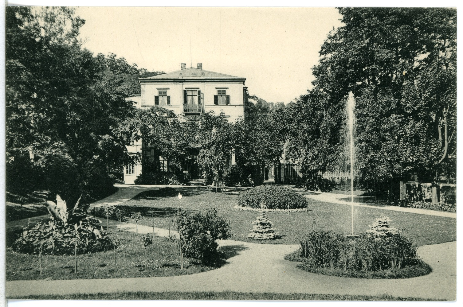 Kötzschenbroda; Monrepos This postcard is from publisher Brück & Sohn in Meißen ( postcard has a unique number 12664 and is available in a higher resolution at the publisher. This images was uploaded in a cooperation project between Wikipedians and the publisher.